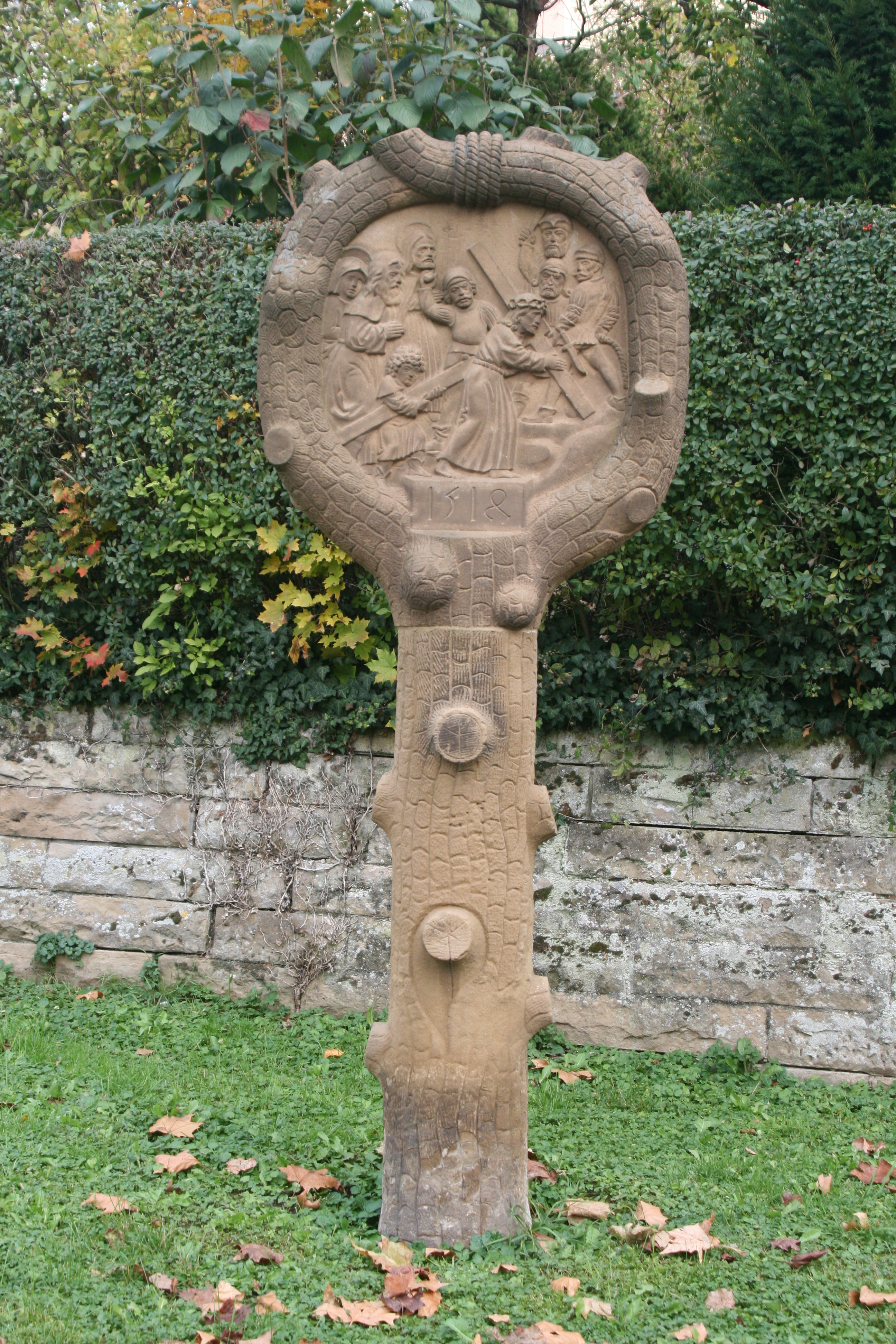 Bildstock an der Armsündersteige in Heilbronn. Kopie von Robert Gräßle[1] aus dem Jahr 1957. Das Original von 1514 stammt höchstwahrscheinlich von Hans Schweiner. ↑ see [1]